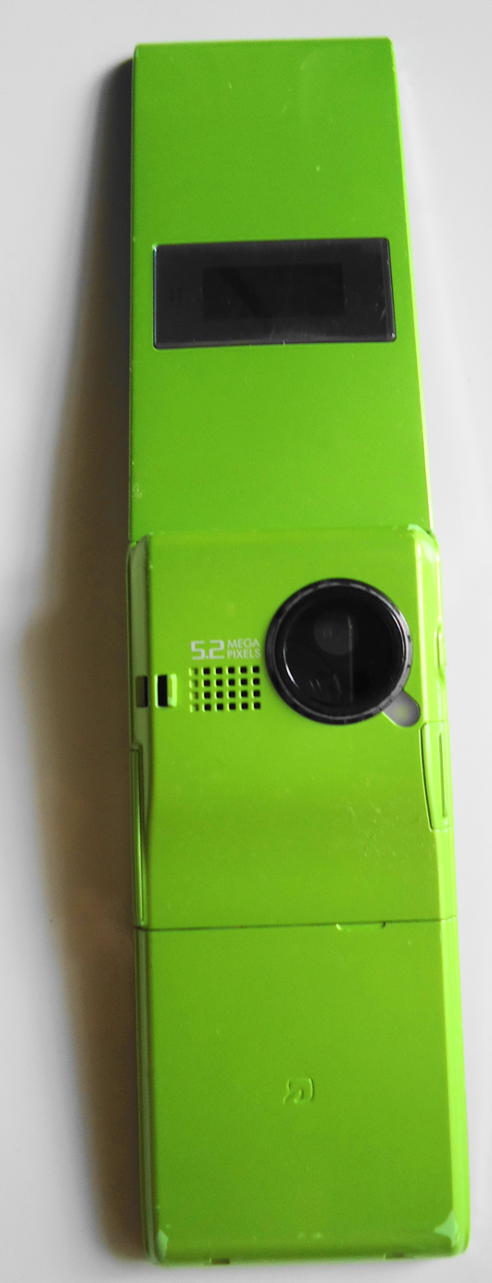 NTTドコモ SH-02A (ライムグリーン) 開いた状態の裏側